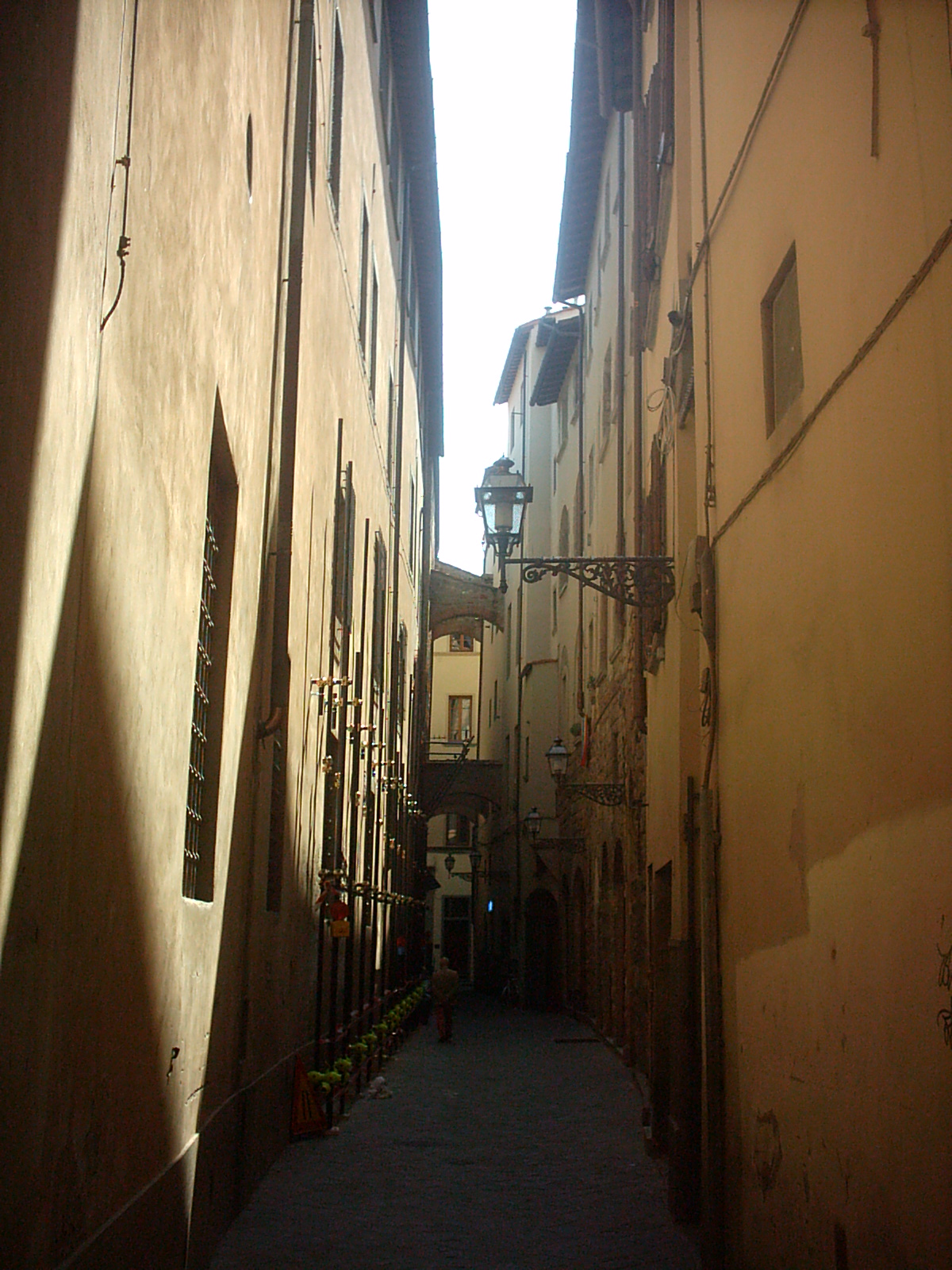 Chiasso dei Baroncelli, stretta viuzza posta sul retro di Piazza della Signoria, sede di molte tra le Arti Minori di Firenze